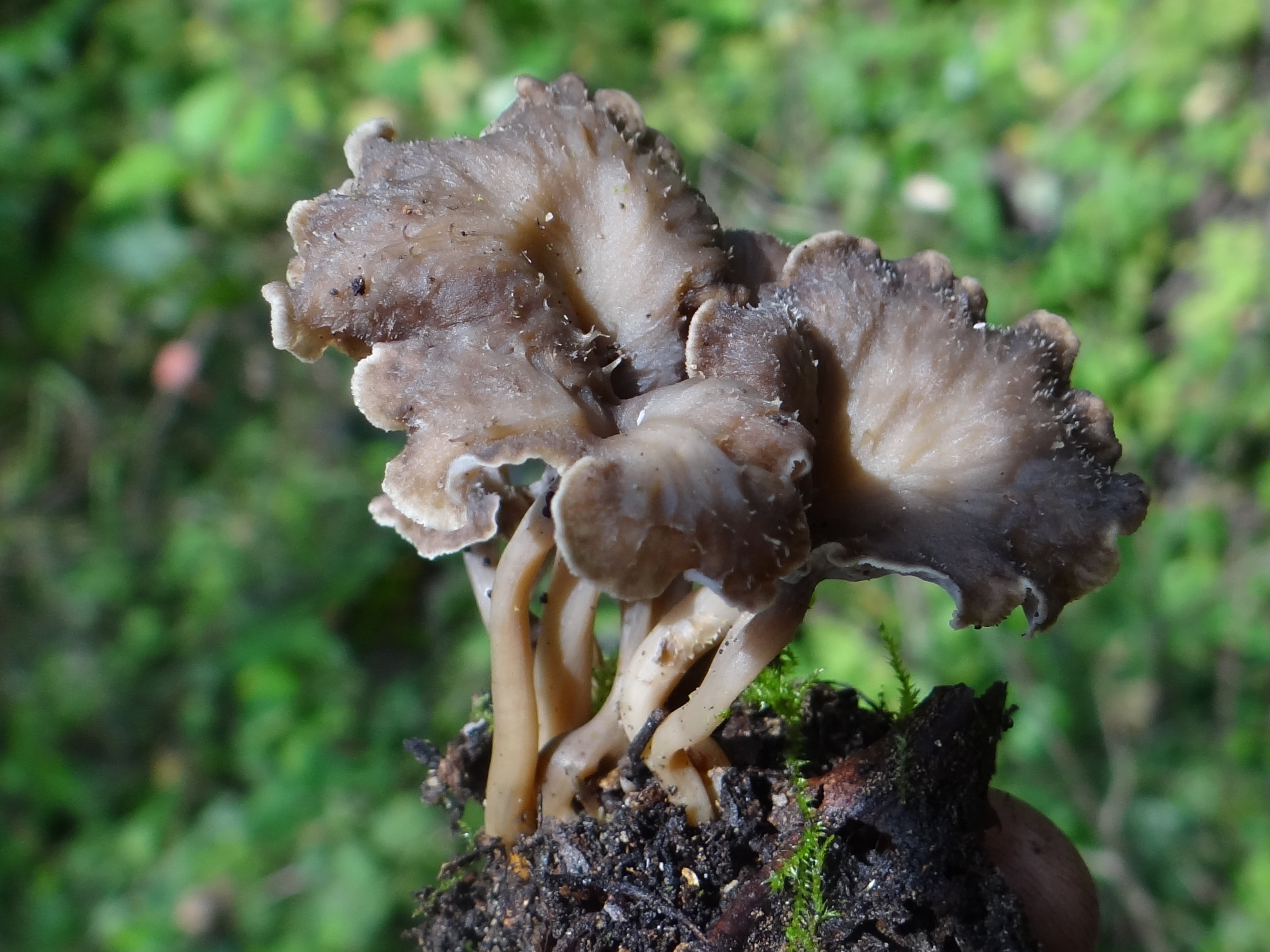 Pseudocraterellus undulatus (location: Poland, Kamionna, województwo małopolskie)